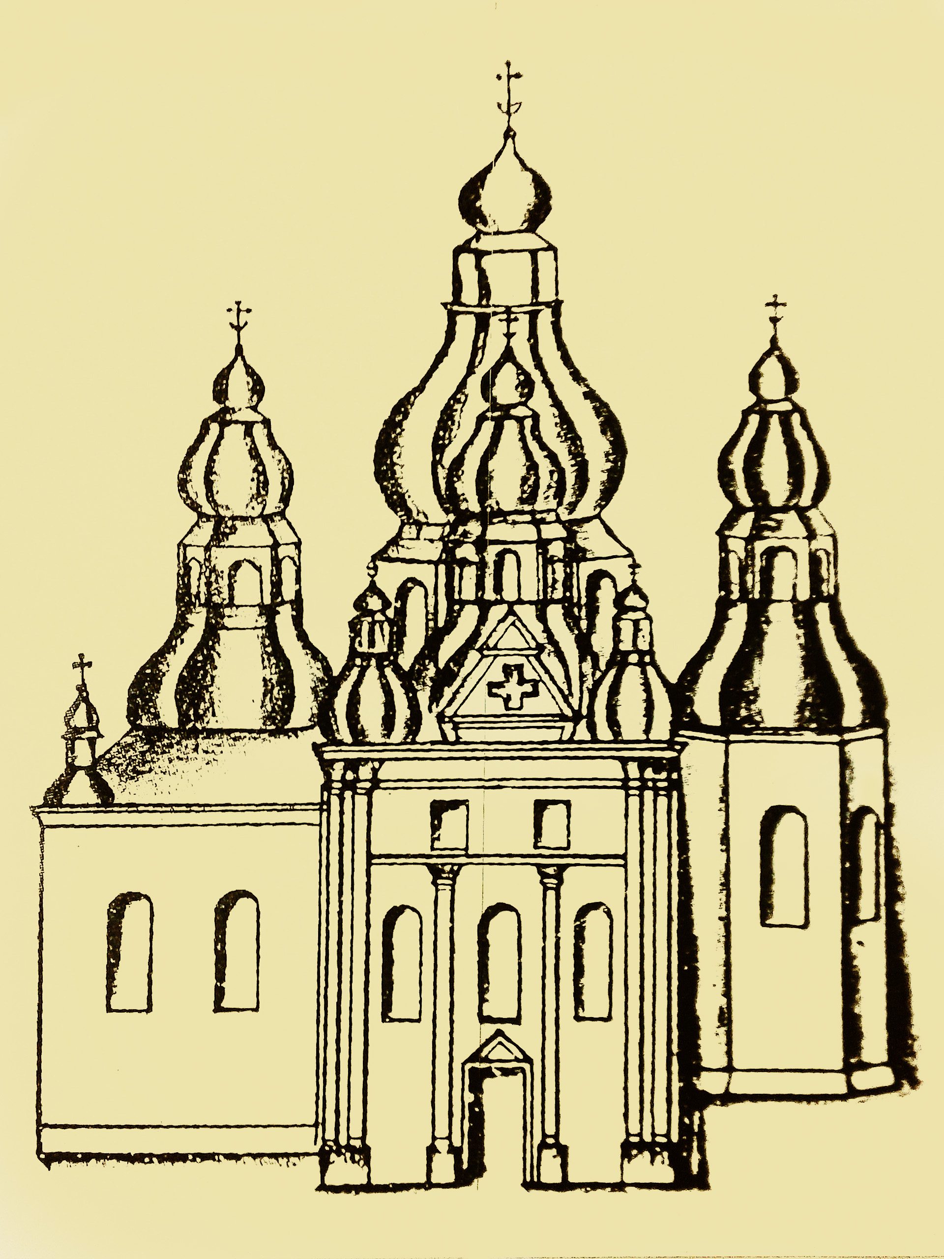 Вознесенський собор. Арсенал. Київ